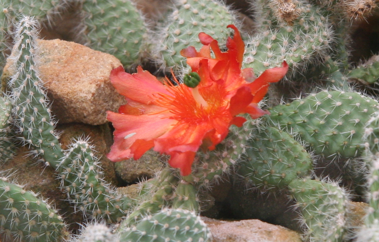 Opuntia picardoi im Botanischen Garten Dresden